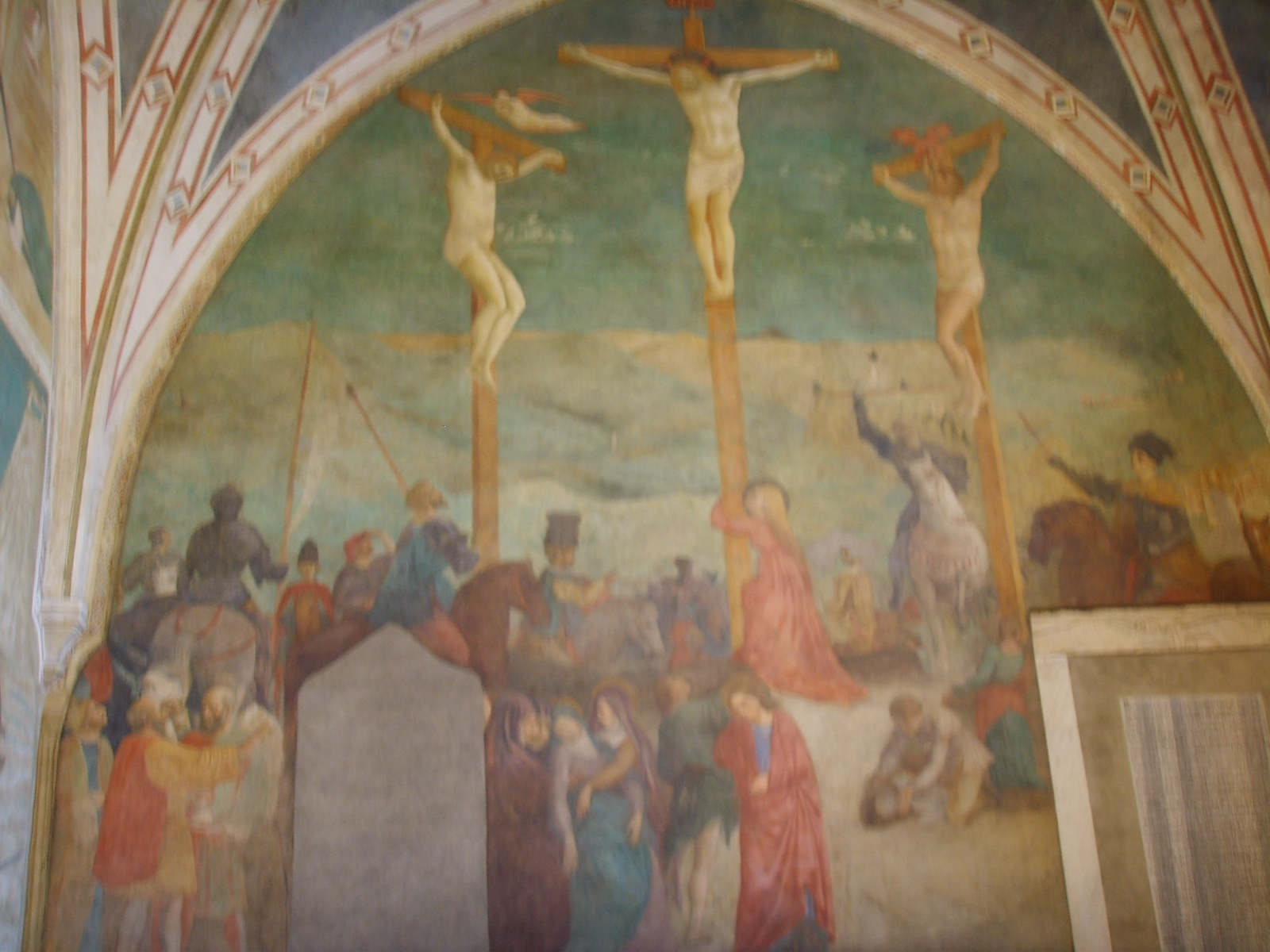 San Clemente church in Rome, frescos by Masolino.